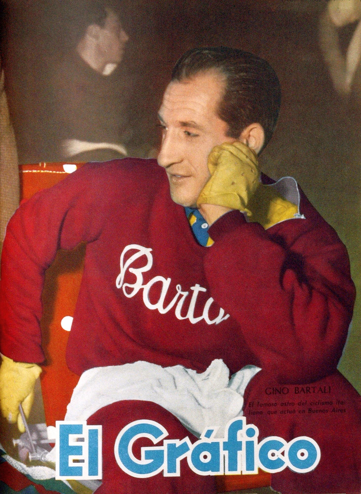 El Grafico del 25 de Enero de 1952. Edicion 1694